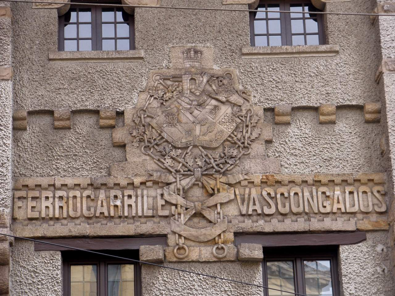 Estacion de Achuri (Bilbao)